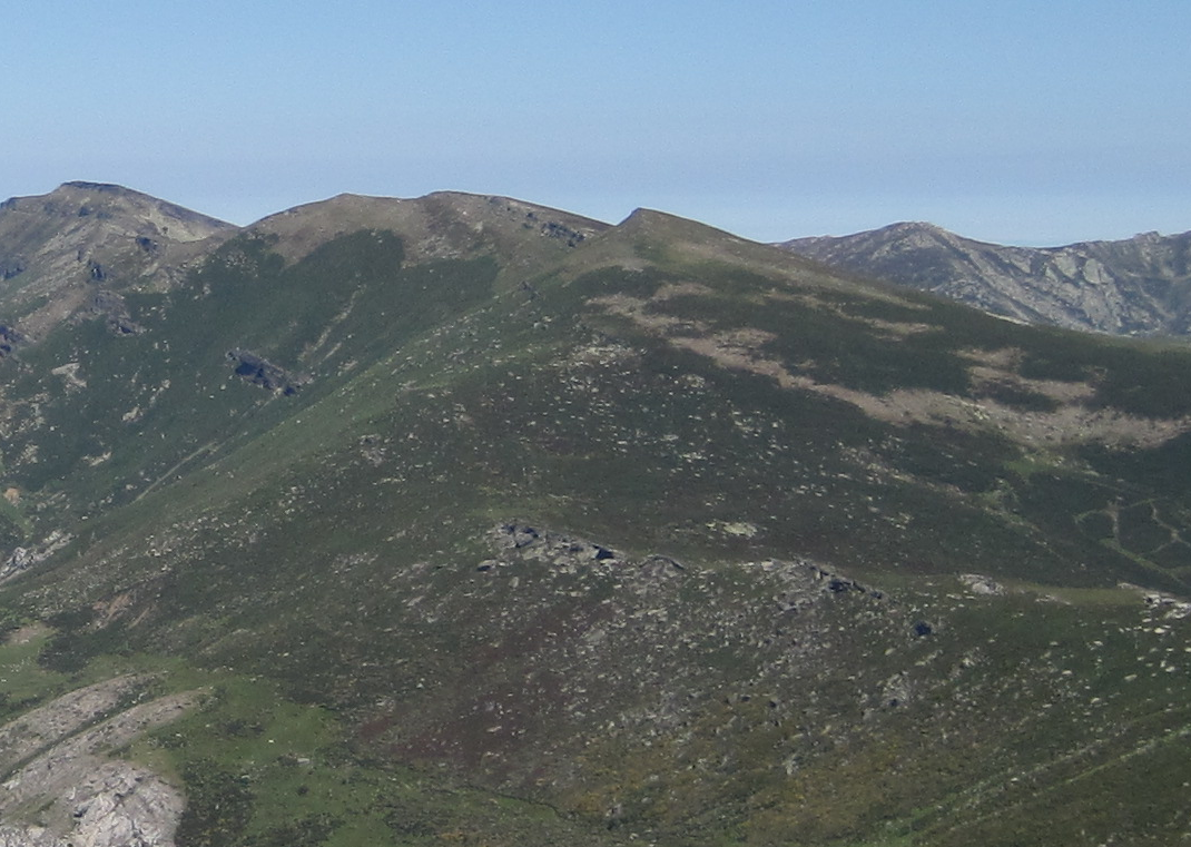 Cueto Mañín desde el Valdecebollas